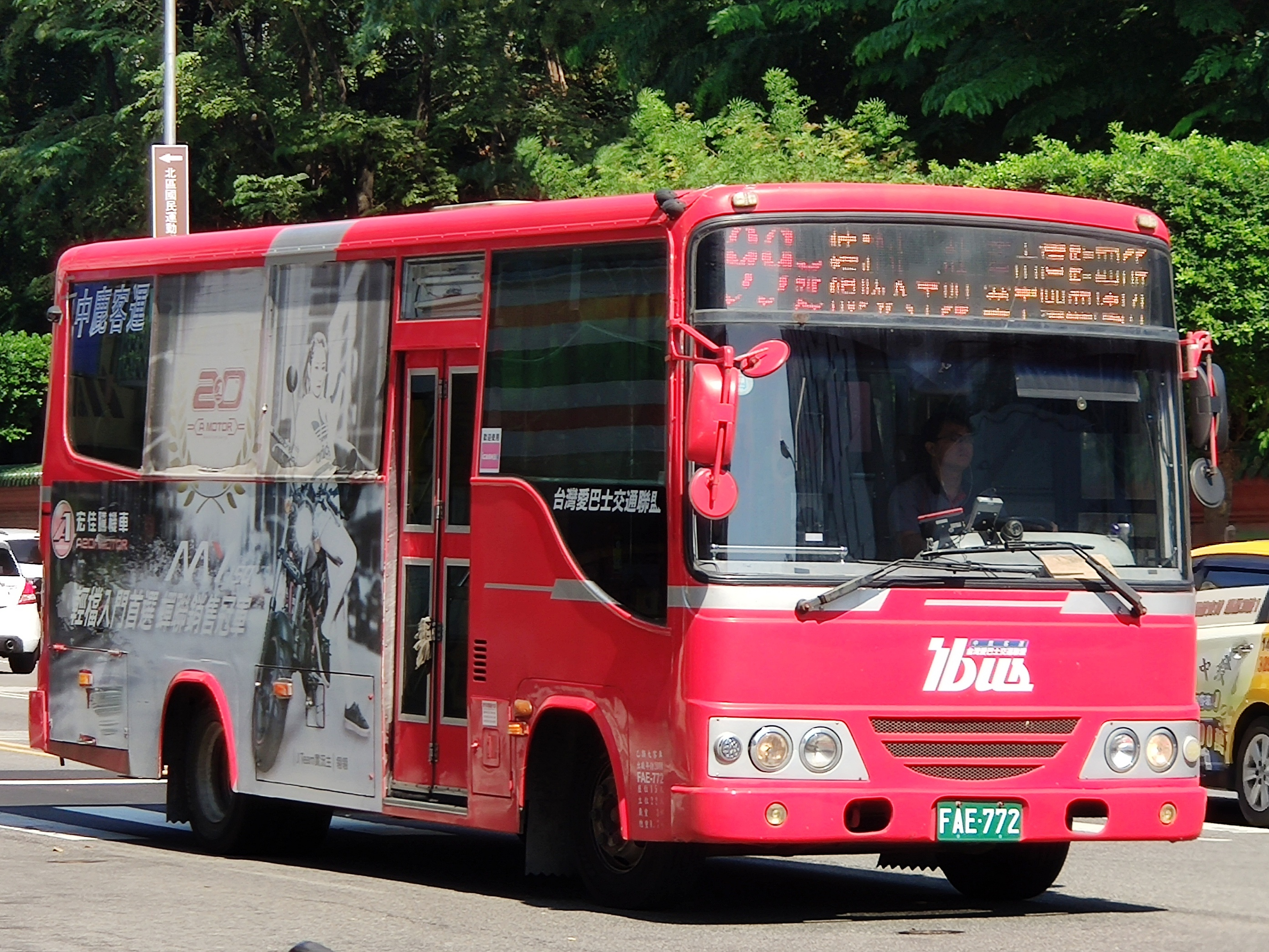 中鹿客運 ISUZU NQR75PBL大客車 FAE-772